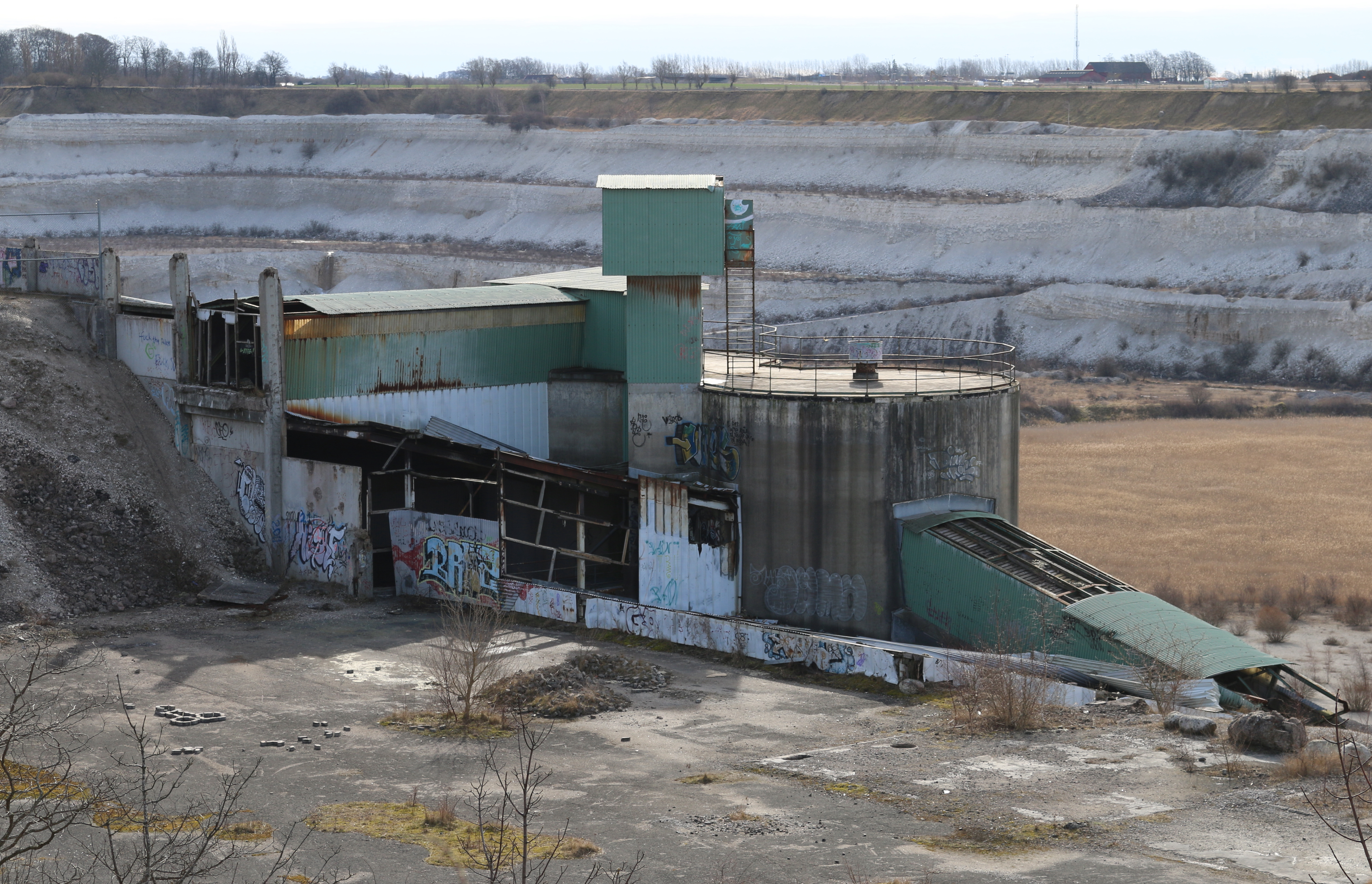 Limhamns kalkbrott i mars 2015